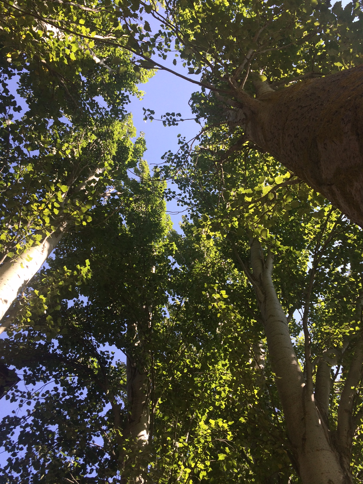 Plano nadir de un bosque o conjunto de abedules. La imagen representa la visión subterránea del bosque.